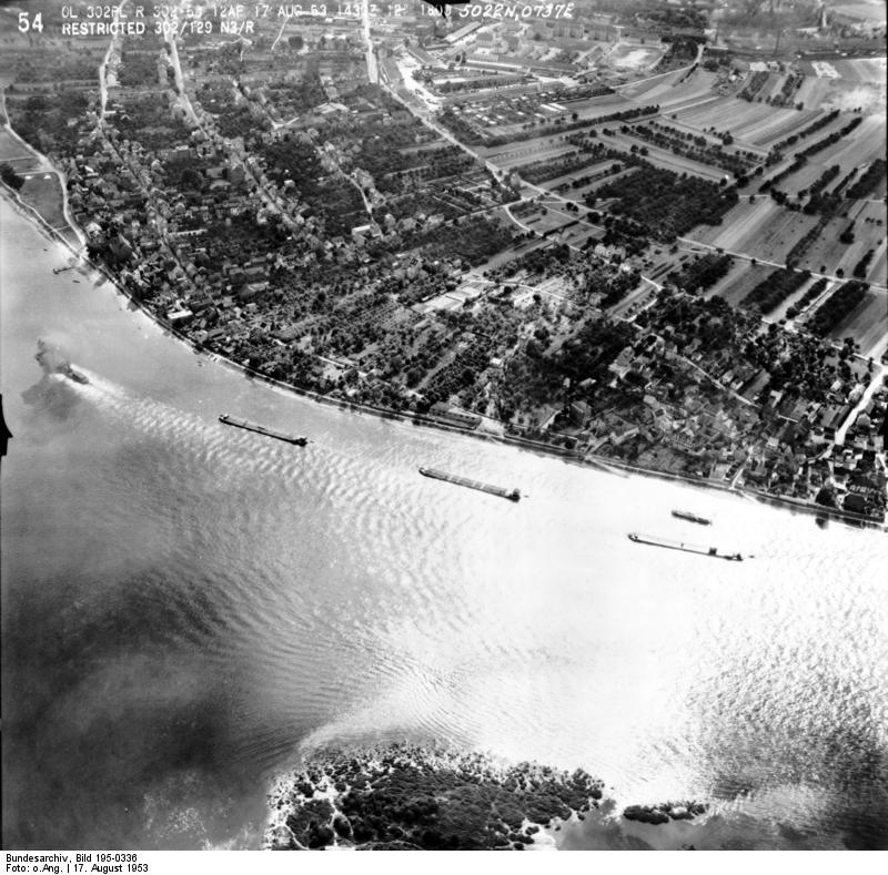 Rheinbefliegung der Alliierten 1953